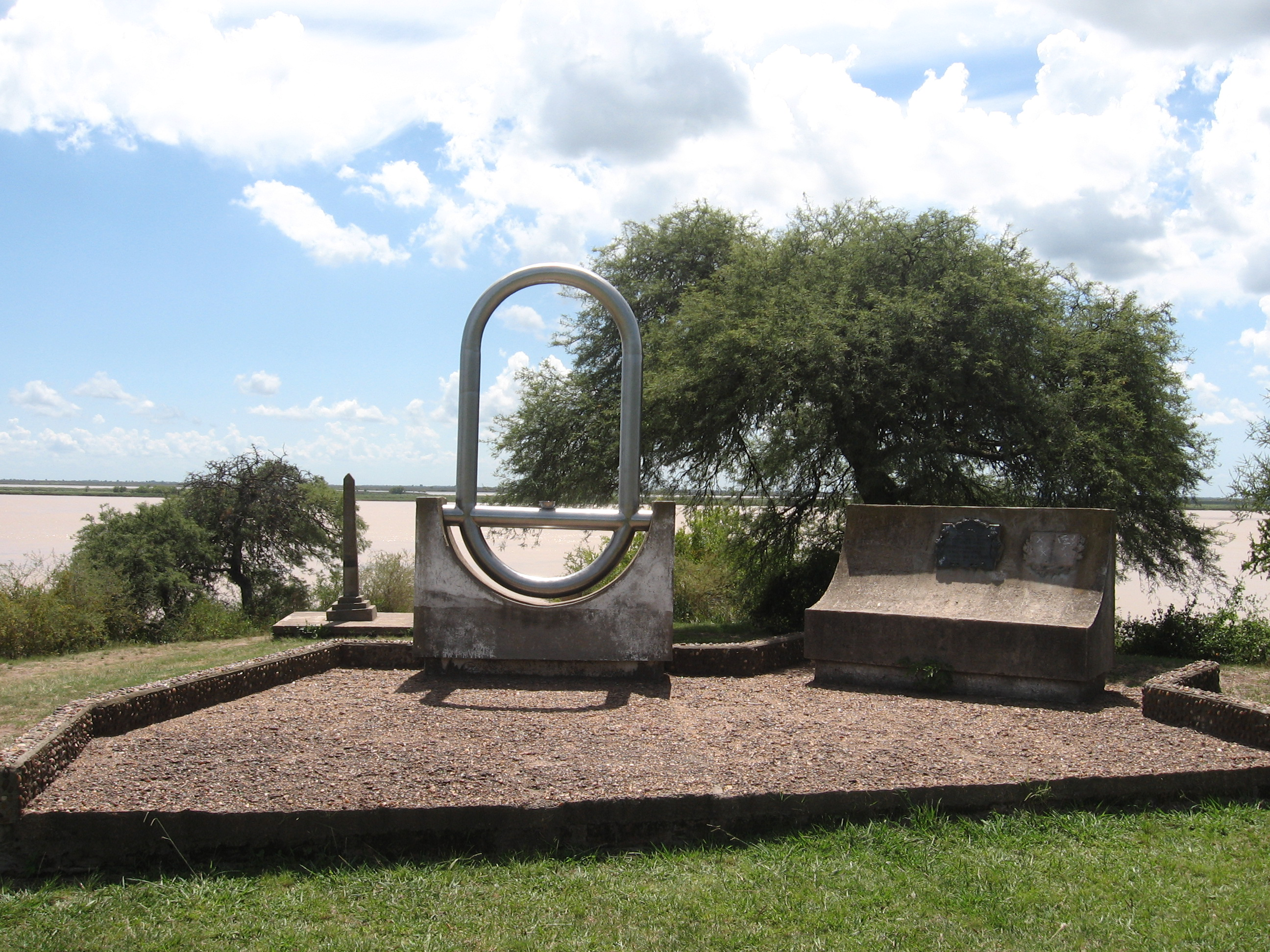 Monumento de San Pedro a los héroes de la batalla de Vuelta de Obligado, en el sitio en donde se celebró la misma